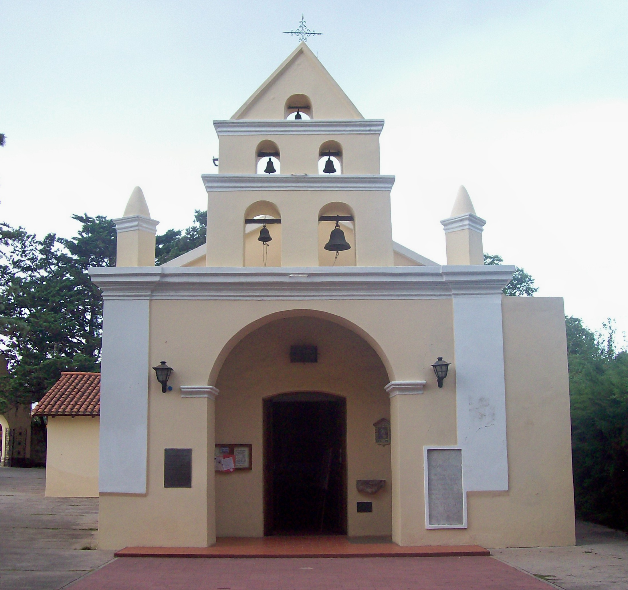 Frente de la Iglesia de San Antonio, en Valle Hermoso, provincia de Córdoba, Argentina.